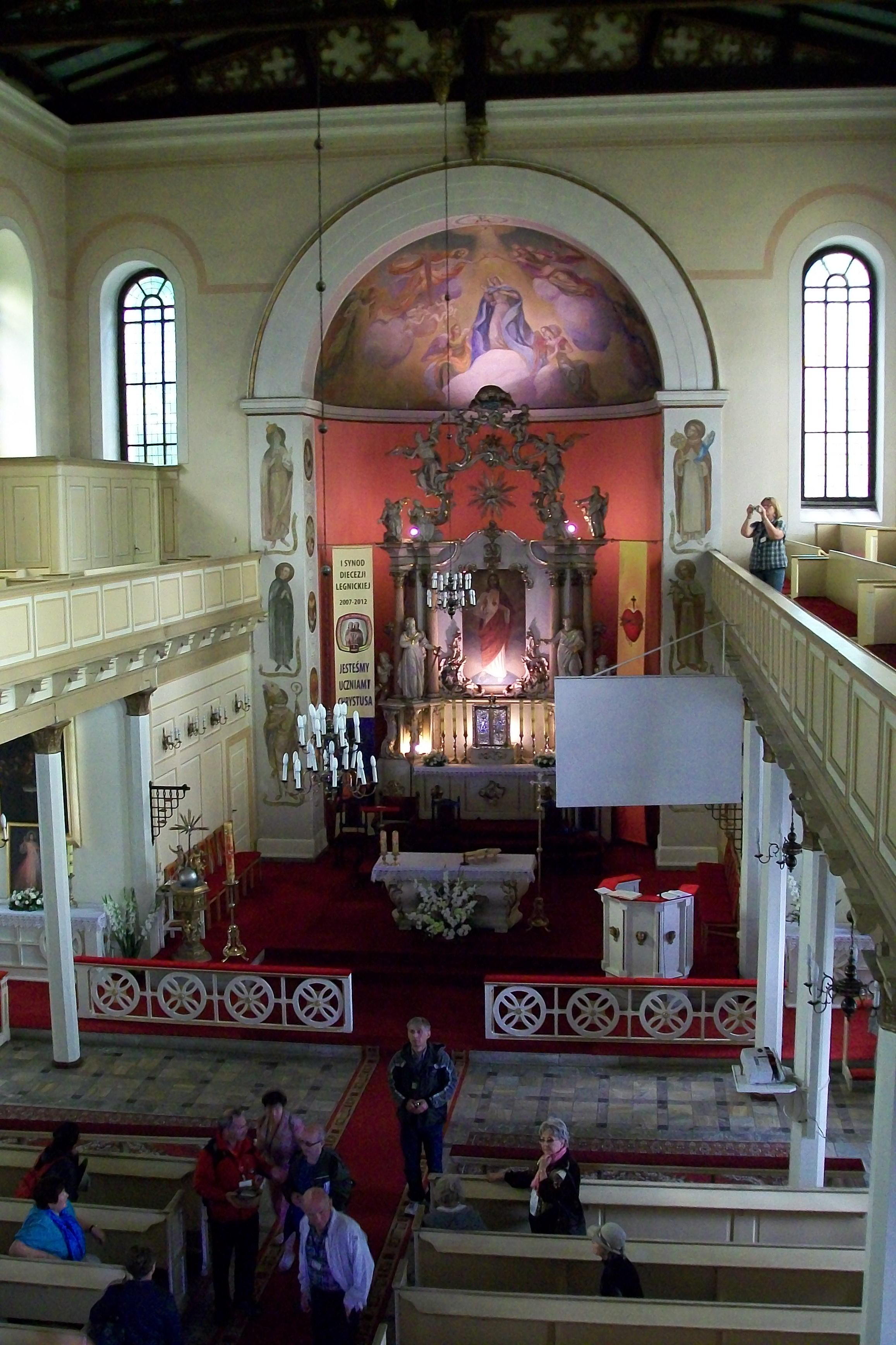 Innenansicht der ehemals protestantischen Kirche in Mysłakowice / Erdmannsdorf-Zillerthal (Polen).